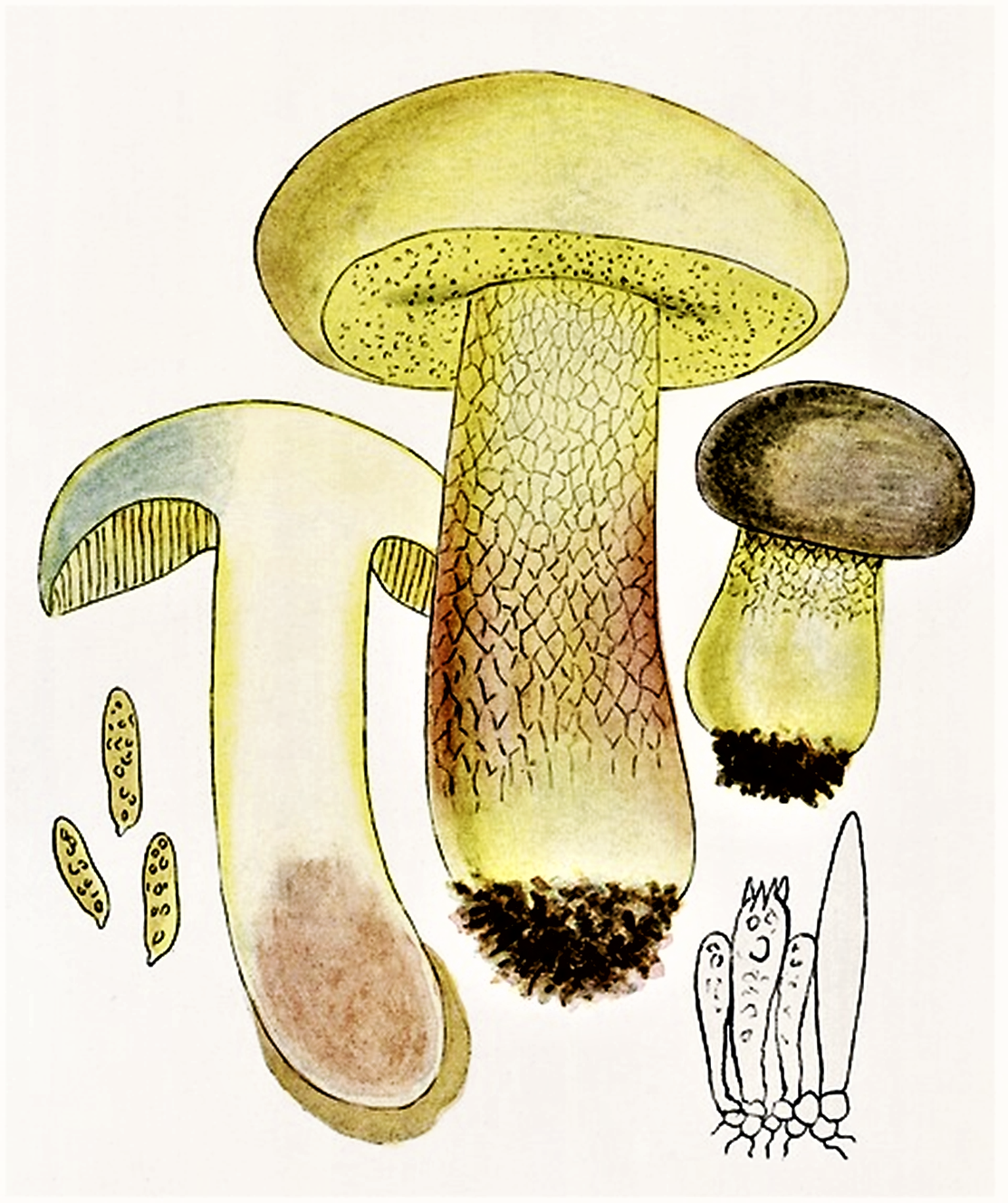 Giacomo Bresadola: Boletus pachypus Fr. (1815), heute Boletus radicans (Fr.) Pers. (1801) bzw. Caloboletus radicans (Pers.) Vizzini (2014)